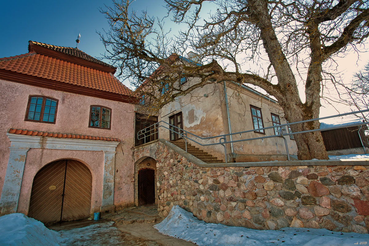 Šlokenbekas viduslaiku pils, Smārde